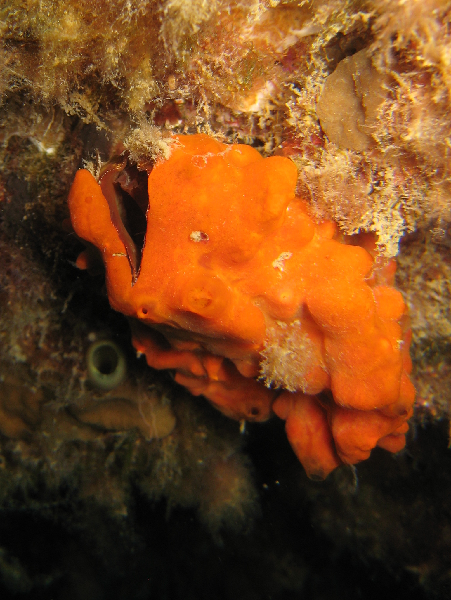 Arche de Noé (Arca noae) recouverte par une éponge Crambe crambe